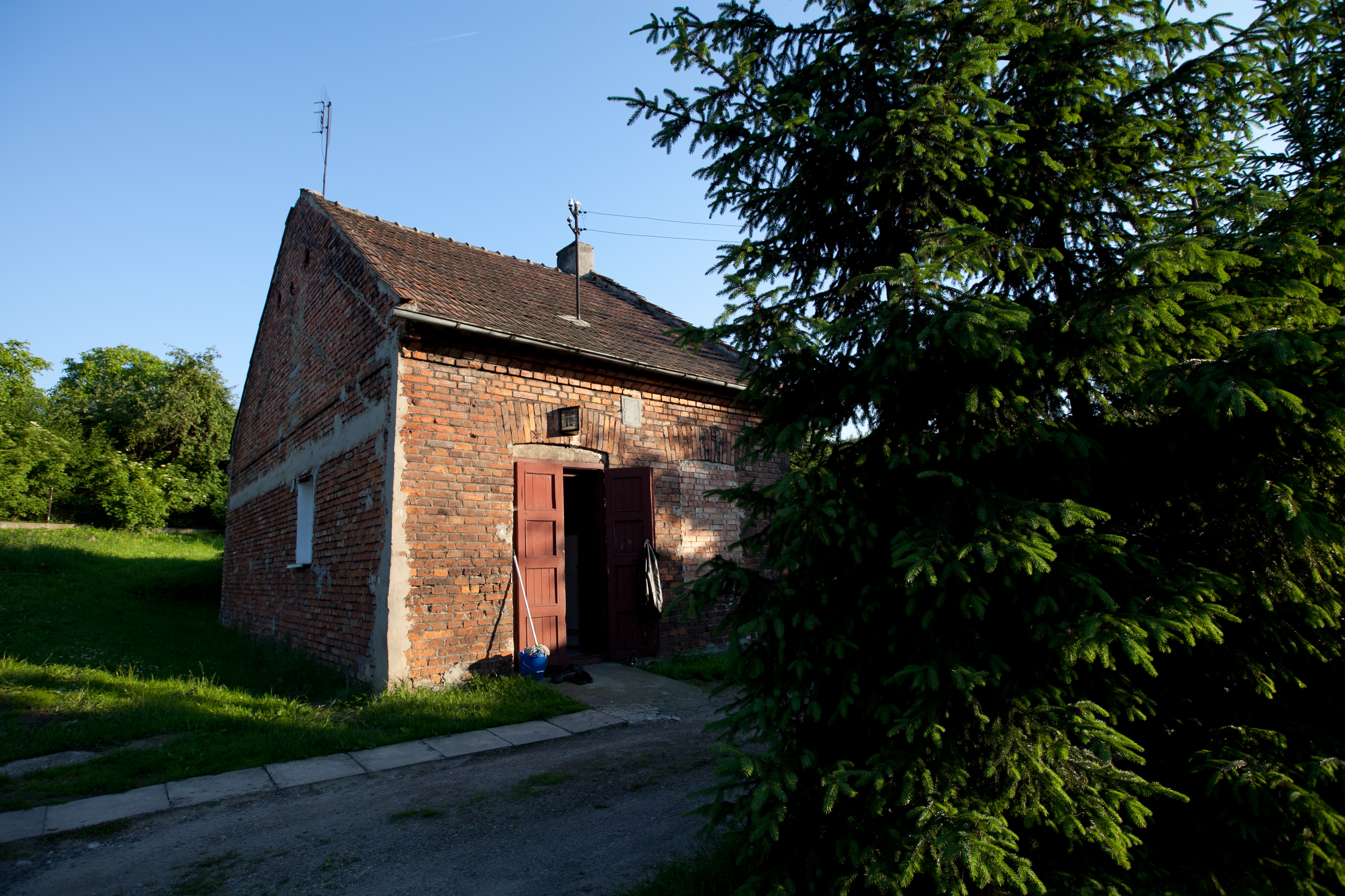 Wieliczka, Klasno, ul. Wiejska